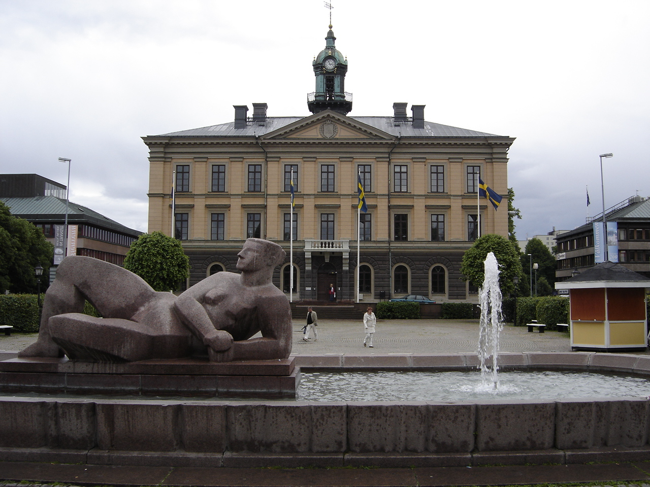 Gävle